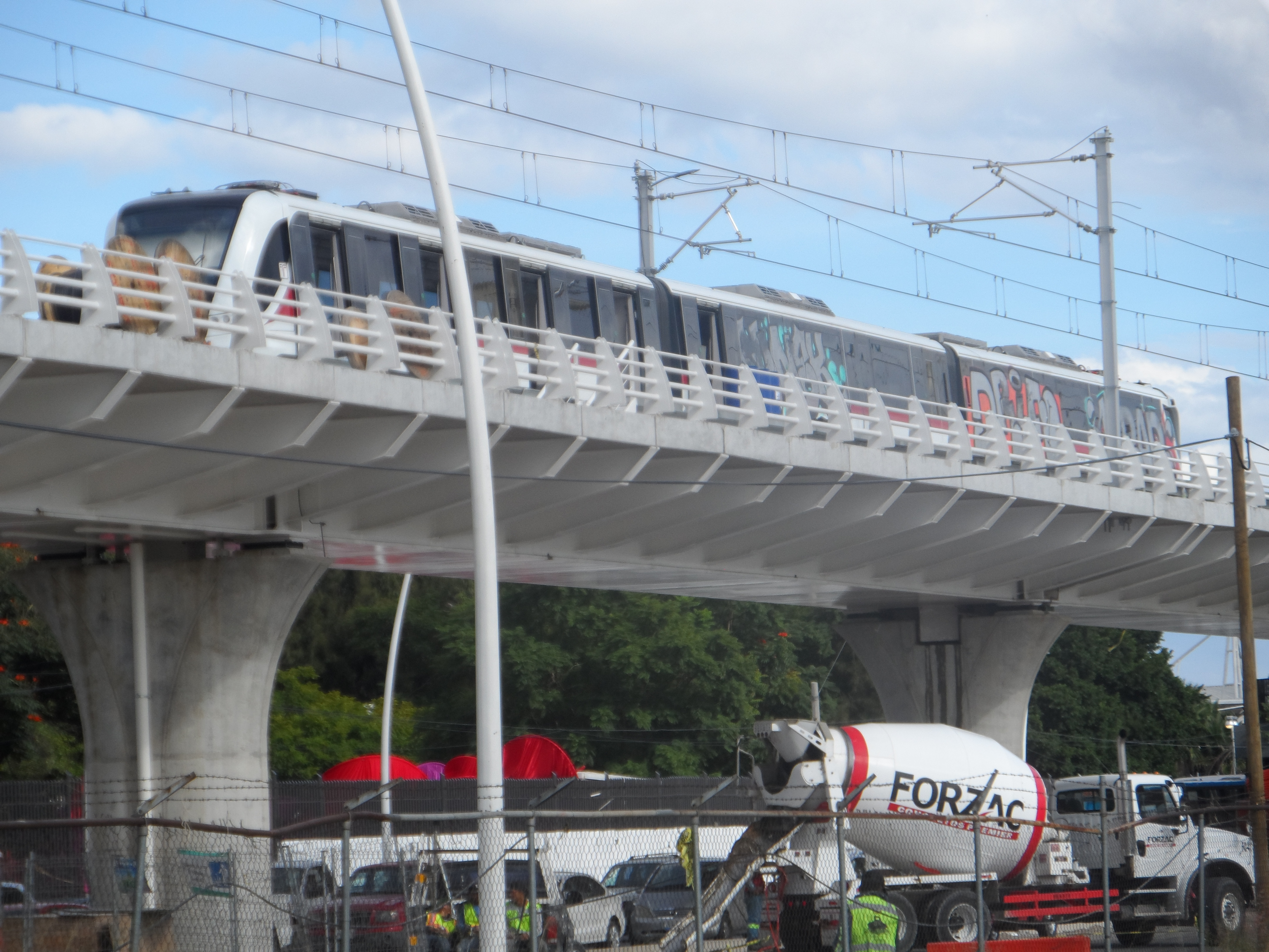 Tren "Metrópolis 9000" de la Línea 3 del Tren Ligero de Guadalajara vandalizado (grafitis) cerca de la estación Plaza Patria de dicha línea.